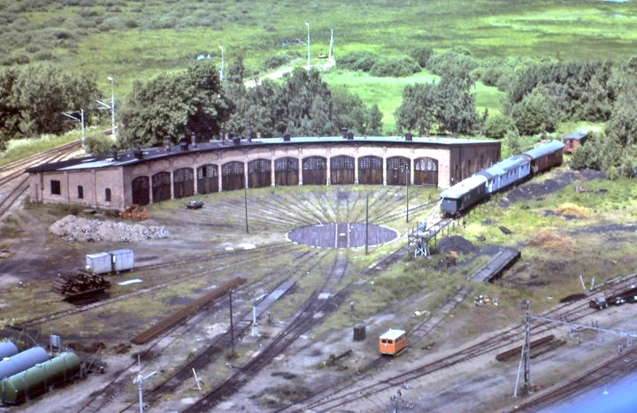 Kristianstads lokstation, rundlokstallet med vändkskivan, fotograferad från vattentornet 1981.